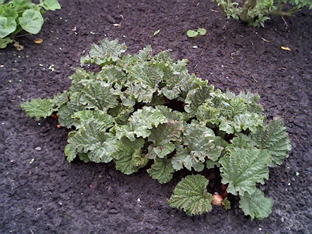 Rabarber. Serie foto's van een rabarberplant van 25 maart 2005 tot en met 13 mei 2005, één foto per week. Bestandsnamen: Rabarber-serie-1.jpg tot Rabarber-serie-8.jpg. Foto zelf gemaakt. Public Domain.